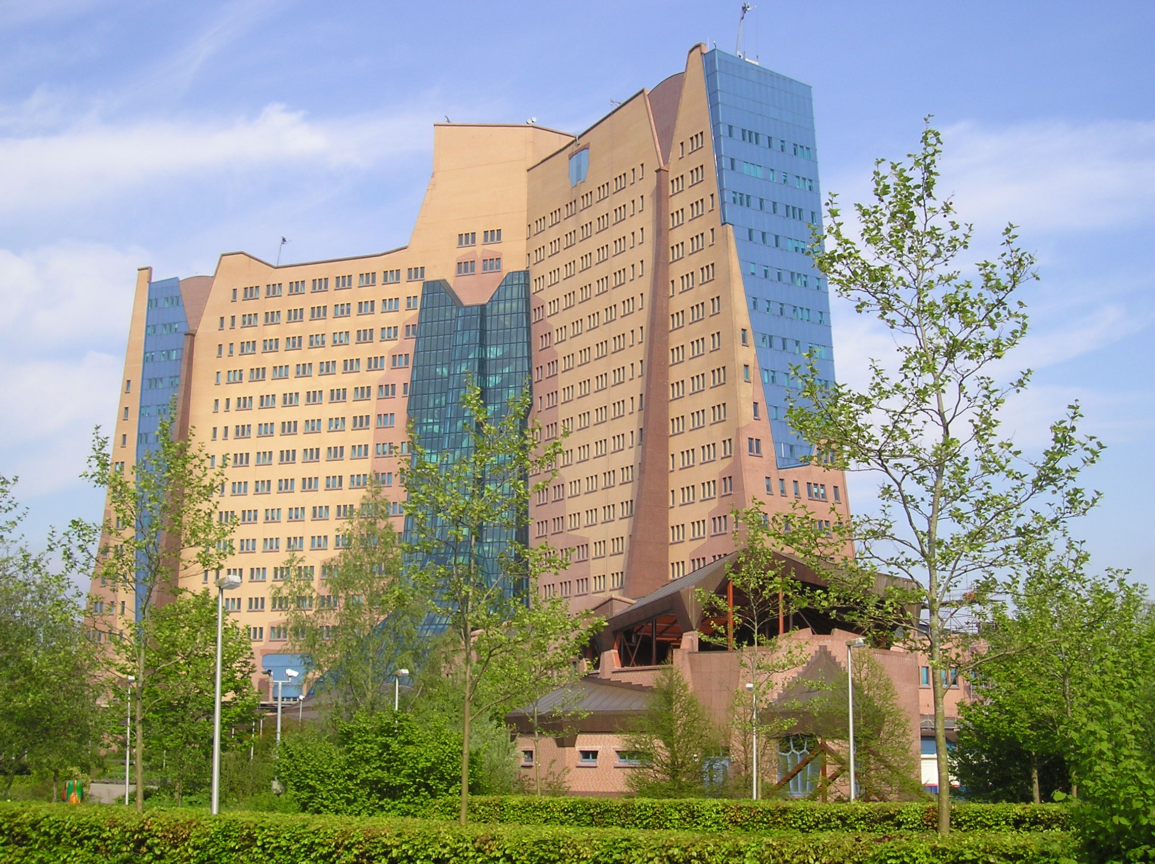 Gasuniegebouw is het hoofdkantoor van de NV Nederlandse Gasunie. Het is ontworpen door architectenbureau Alberts en van Huut.